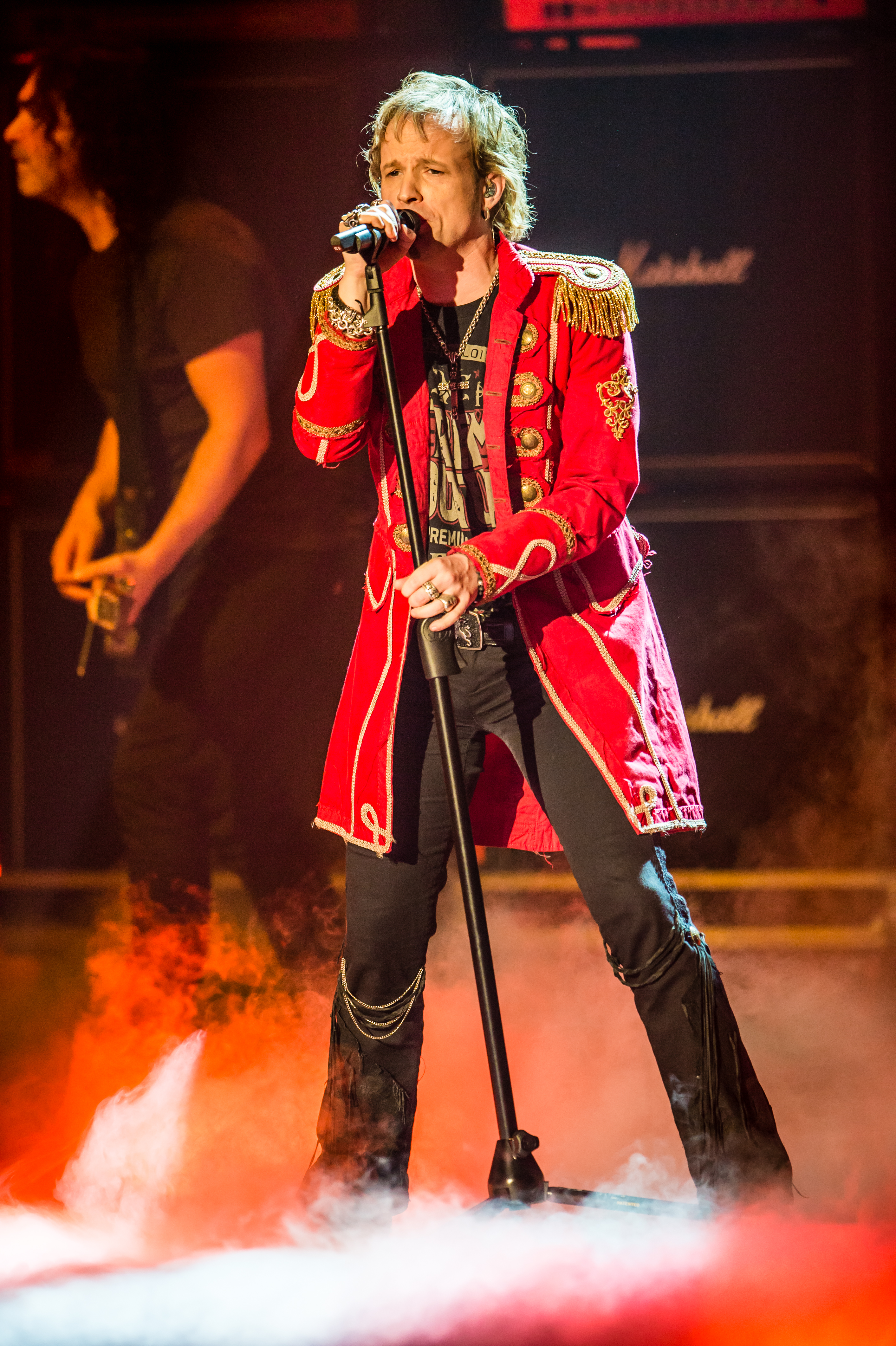 Eurovision Song Contest 2016 - Unser Lied für Stockholm - Avantasia